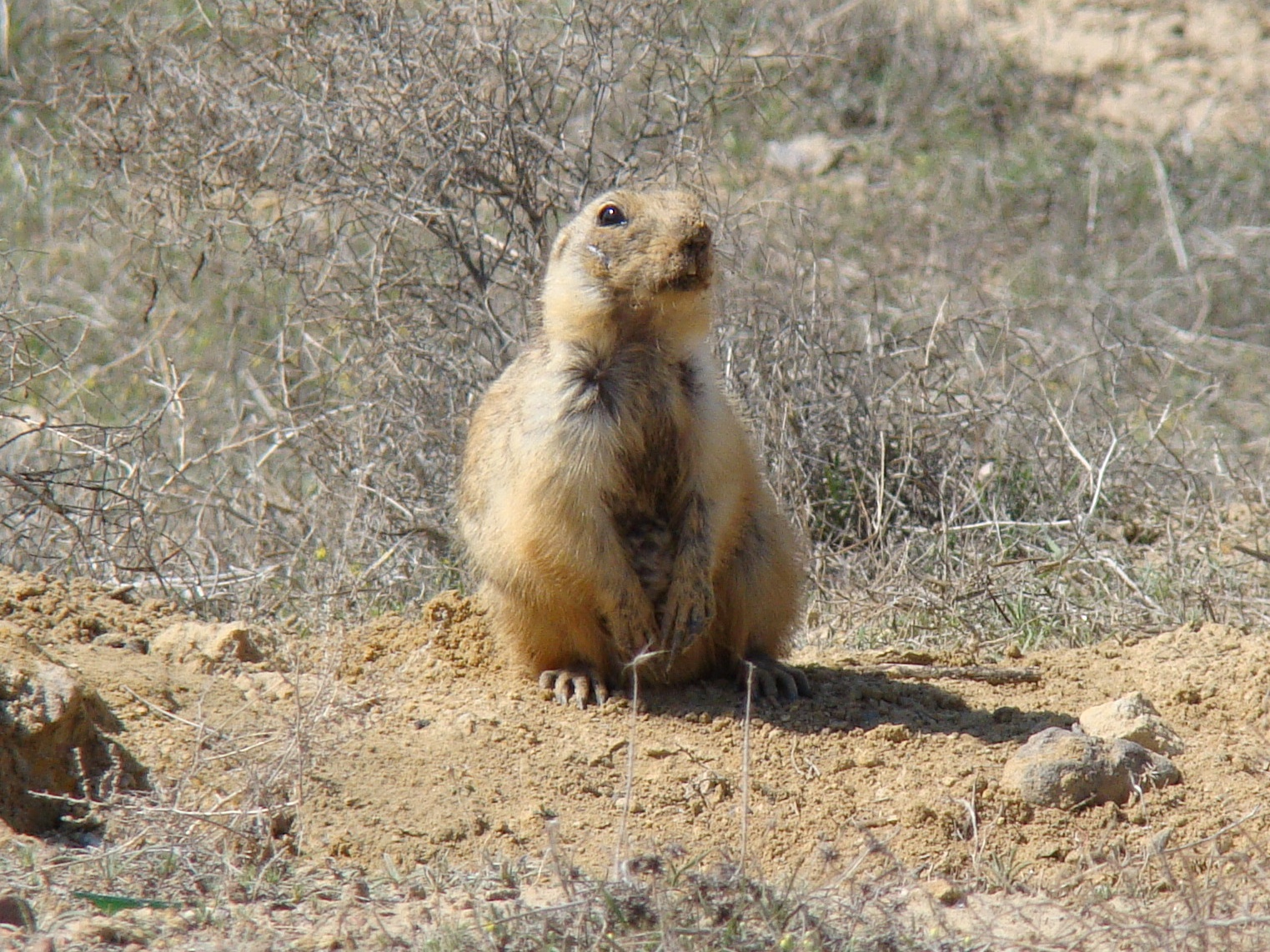 Суслик жёлтый (Spermophilus fulvus). Город Байконур, Кызылординская область, Казахстан